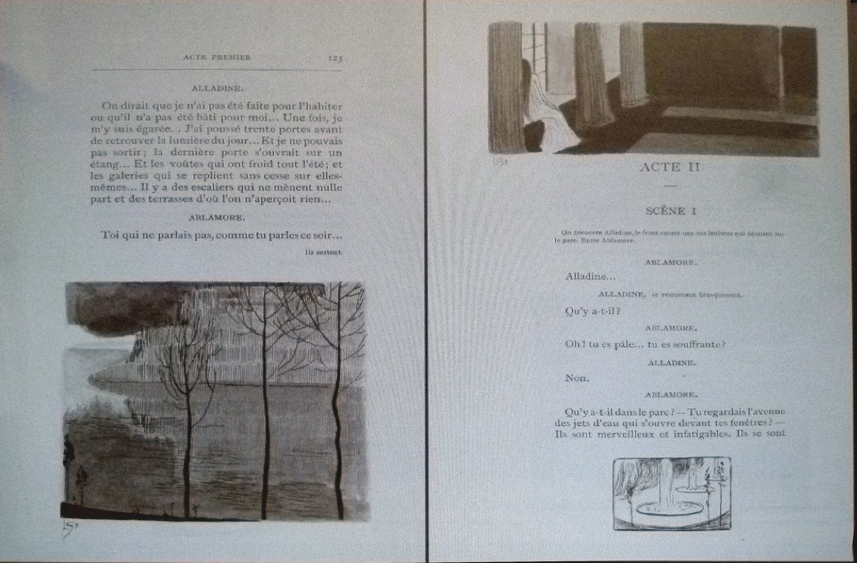 "Alladine et Palomides", Théâtre (Maeterlinck); links: "De terrassen van de burcht"; rechts : "Alladine, starend door het raam" + "de fonteinen"; illustraties door Léon Spilliaert (1903): privébezit